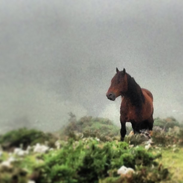 Poney Asturcon à Eslabayo, Asturies, Espagne